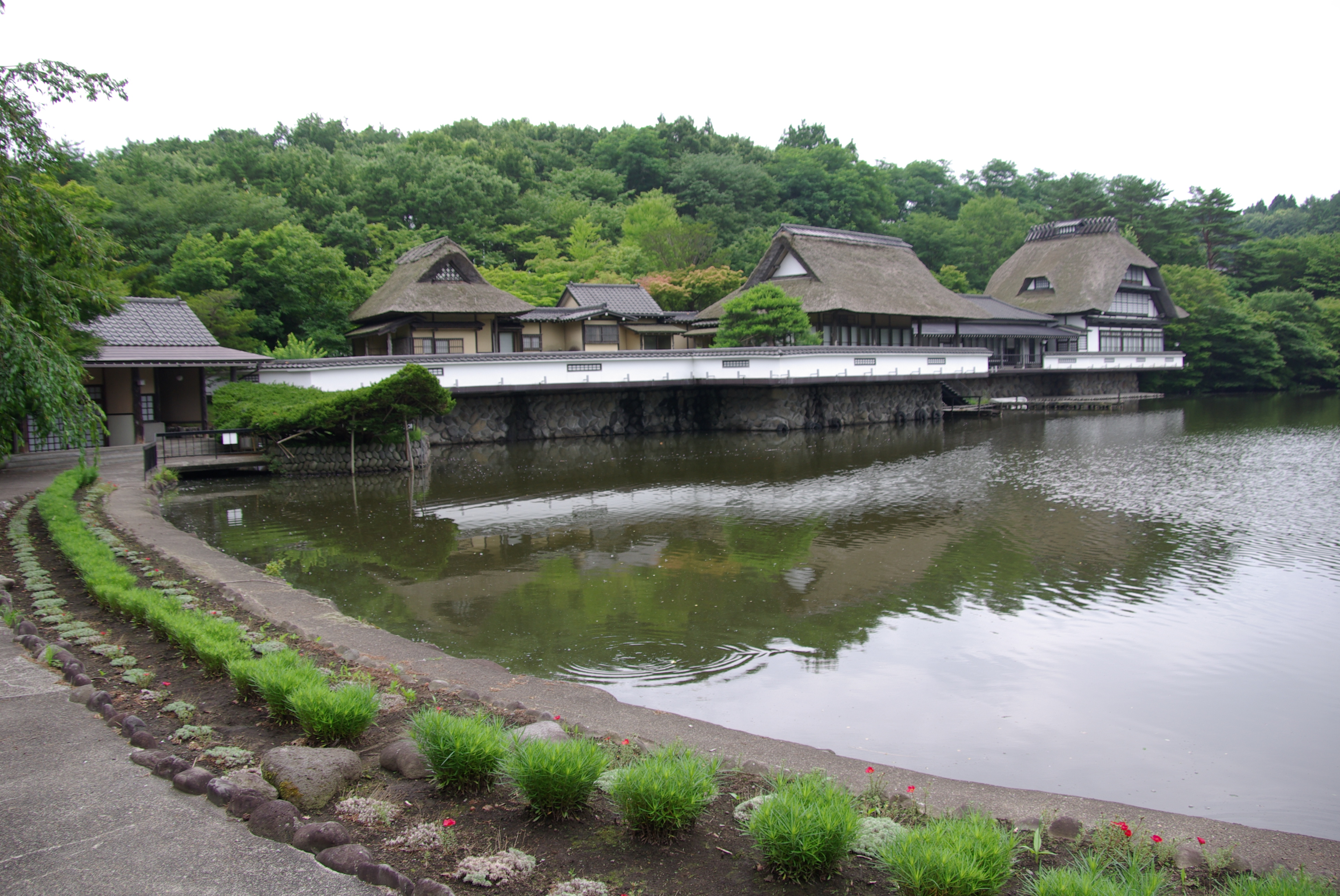 Komaki Onsen Aomoriya, Misawa